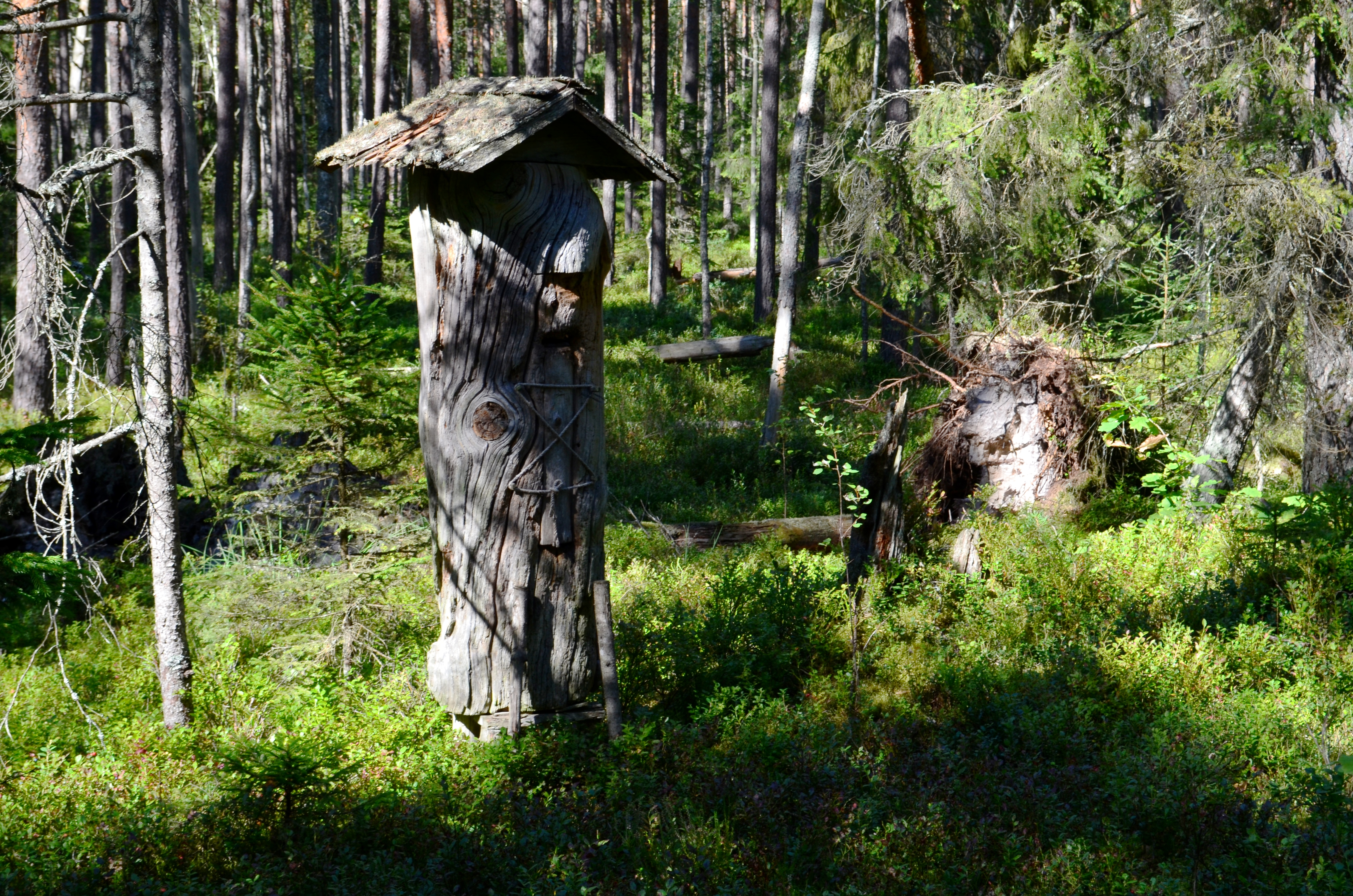 Drevinis avilys drevinės bitininkystės pažintiniame take, Musteikos apylinkės, Varėnos r.